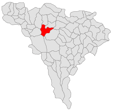 Categorie:Hărţi ale judeţului Alba